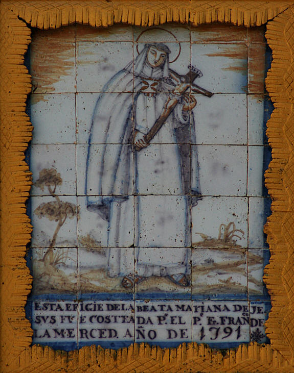 Retablo cerámico con la beata Mariana de Jesús de Madrid, en la Torre de contrapeso del molinom Hacienda la Carraca, Camino del Cementerio, Huevar. Sevilla.